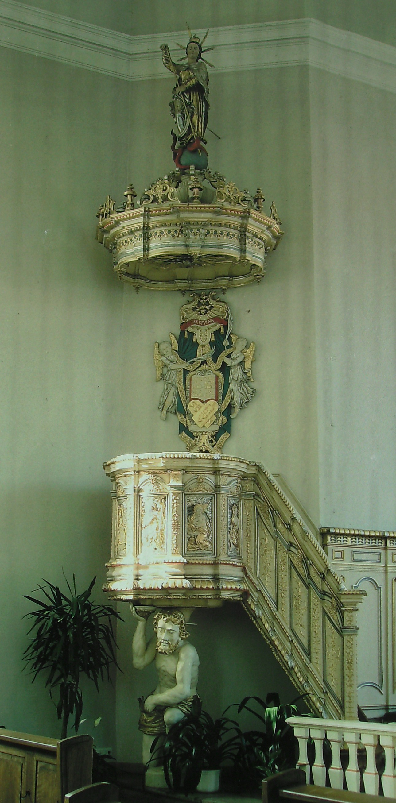 Kirche St. Markus in Gersheim-Reinheim: Kanzel aus der früheren Klosterkirche in Gräfinthal